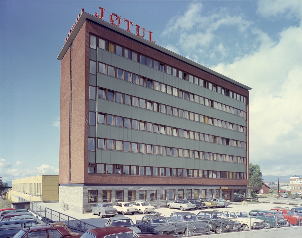 Jøtuls kontorbygg i Grenseveien 97, Oslo